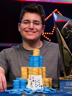 Jake Schindler nach seinem Sieg des 25k High Roller beim PokerStars Caribbean Adventure 2014